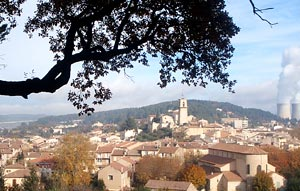 La vieille ville de Gardanne vue de la colline des Frères, d'oÃ¹ l'a peinte Paul Cézanne. Contents 1 Auteur 2 Source 3 Statut 4 Licensing 5 Original upload log Auteur Photographie prise par Bruno Colombari le 30 novembre 2004. Source Archives personnelles Statut Copyright © Bruno Colombari